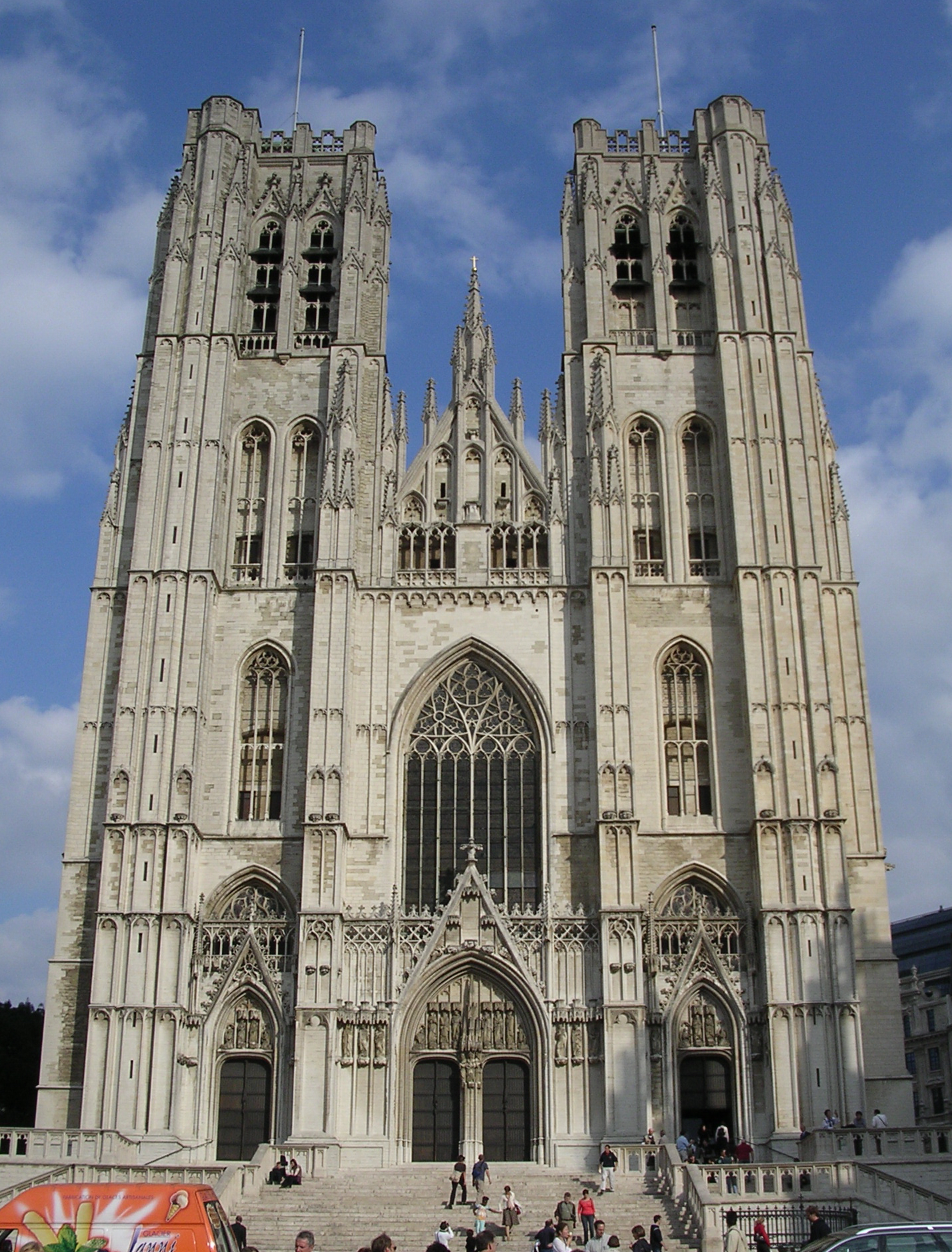 façade